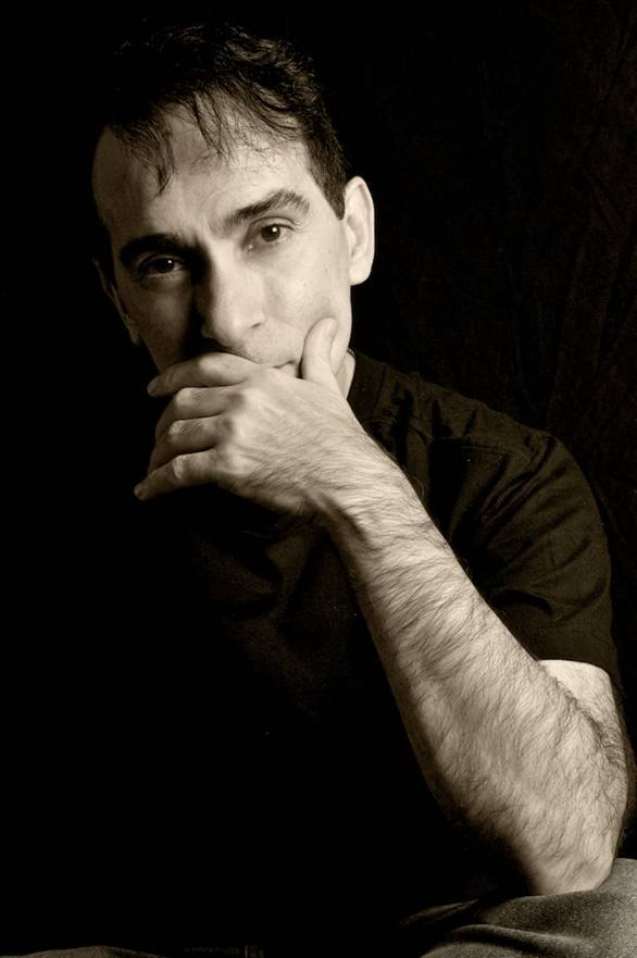 Fred Roldán